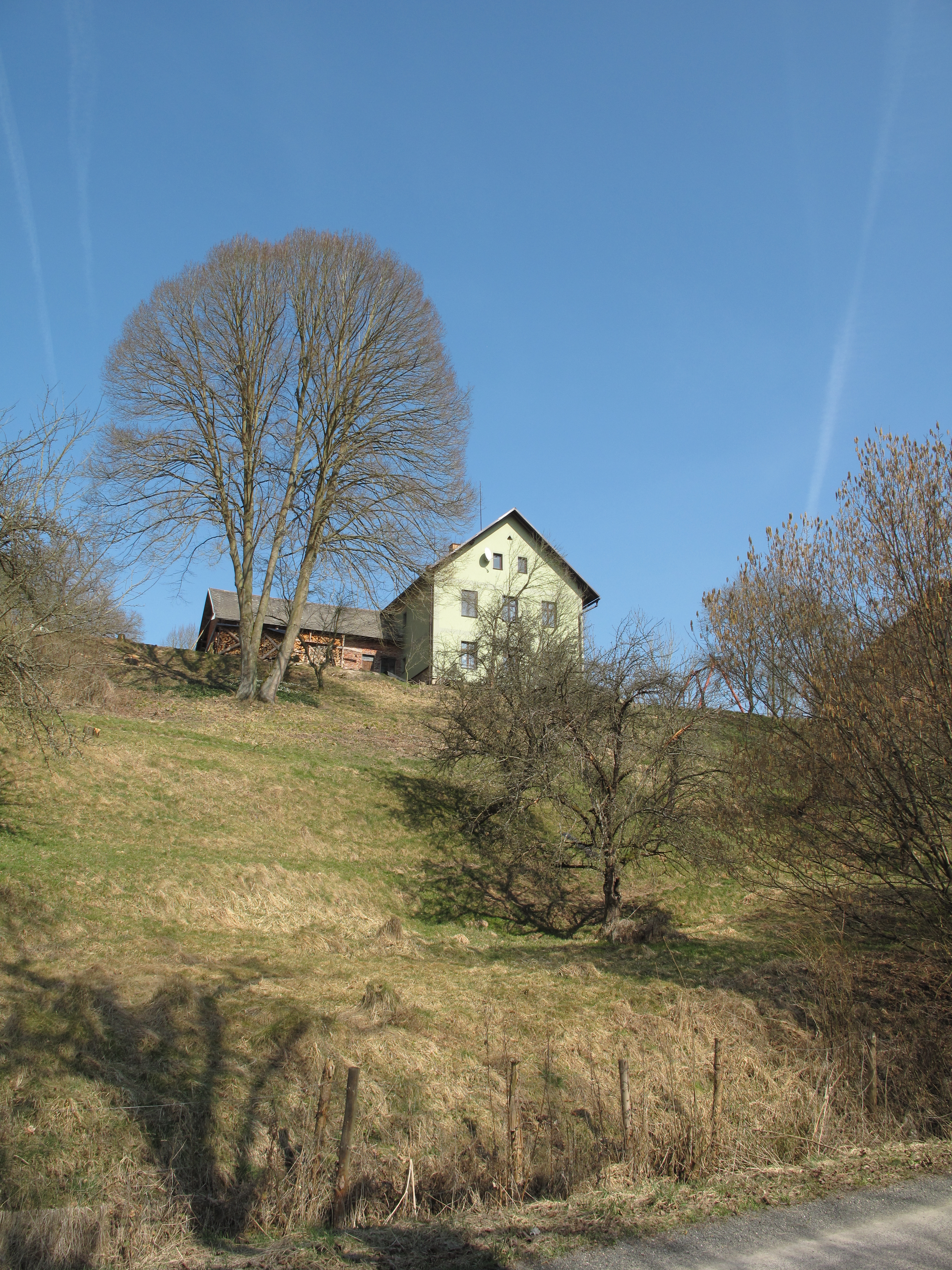 Dům v Chlístově. Okres Liberec, Česká republika.